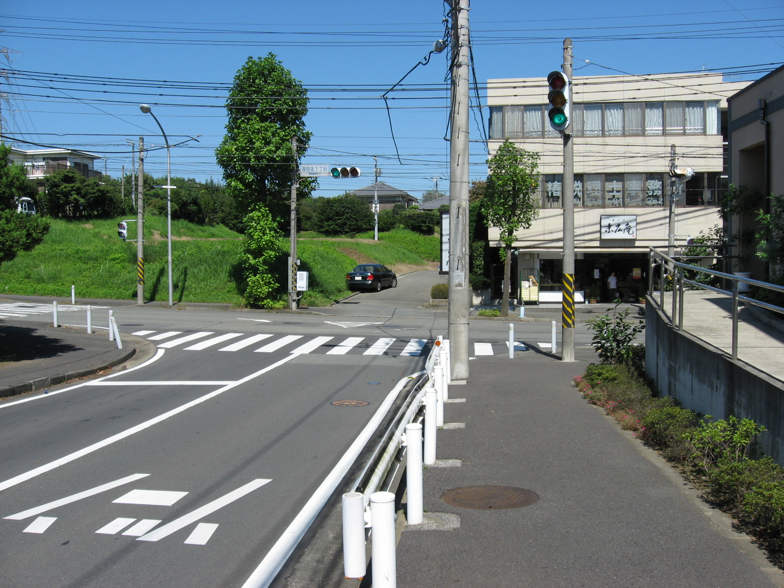 荏田北